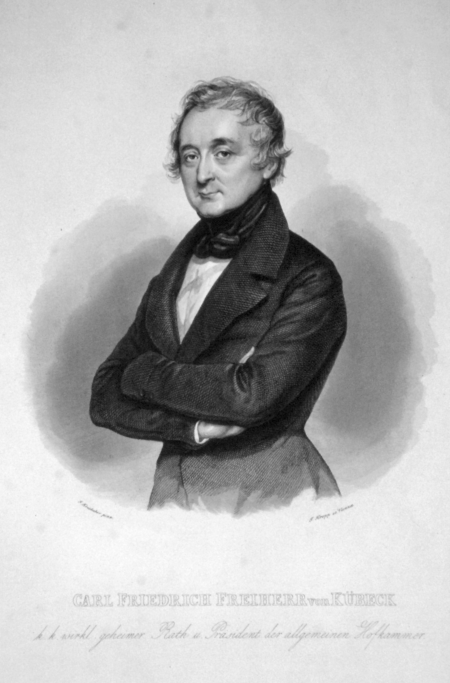 Karl Friedrich von Kübecklabel QS:Lde,"Karl Friedrich von Kübeck"